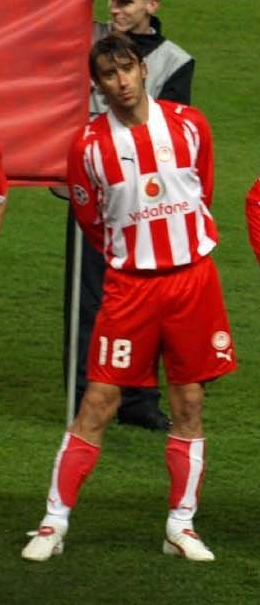 Paraskevas Antzas, Chelsea (3) v (0) Olympiakos